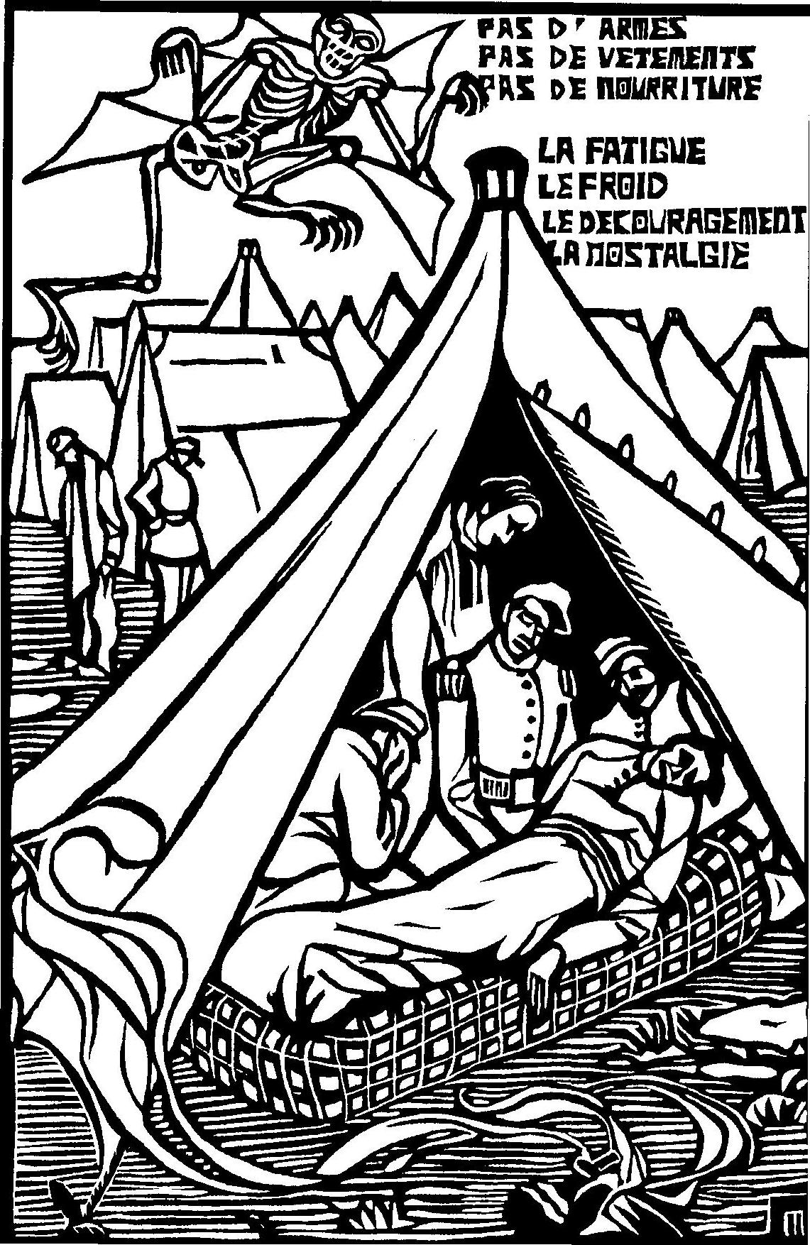 engraving by Jeanne Malivel (d.1926)